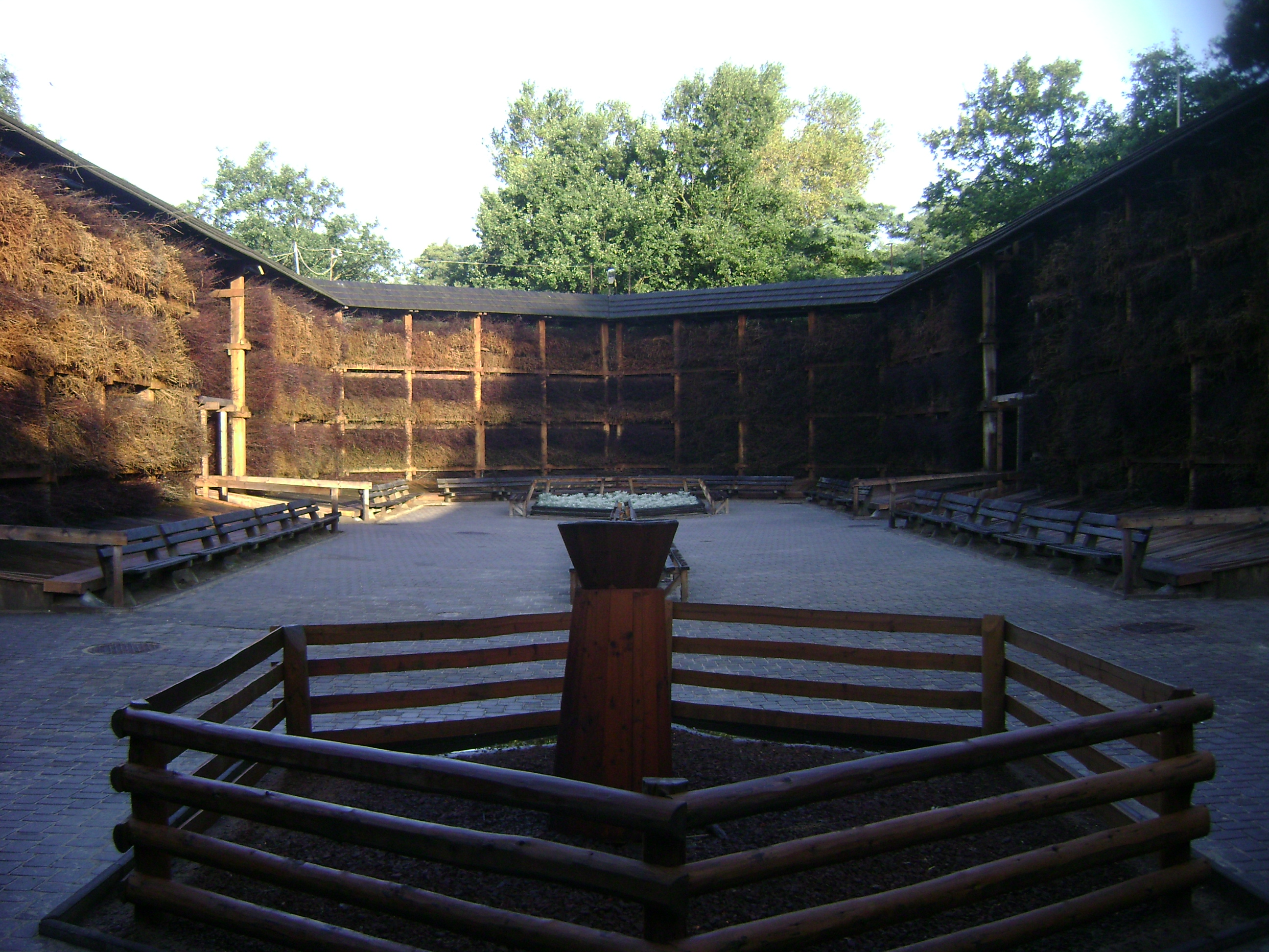 Konstancin-Jeziorna, tężnia solankowa.